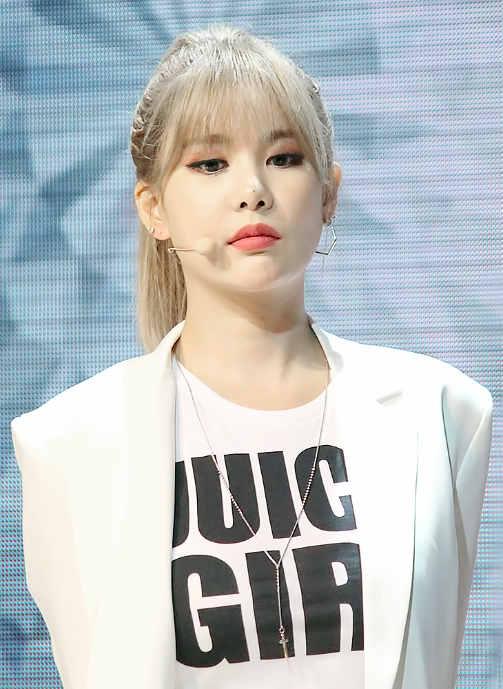 170614 티아라 쇼케이스 직찍